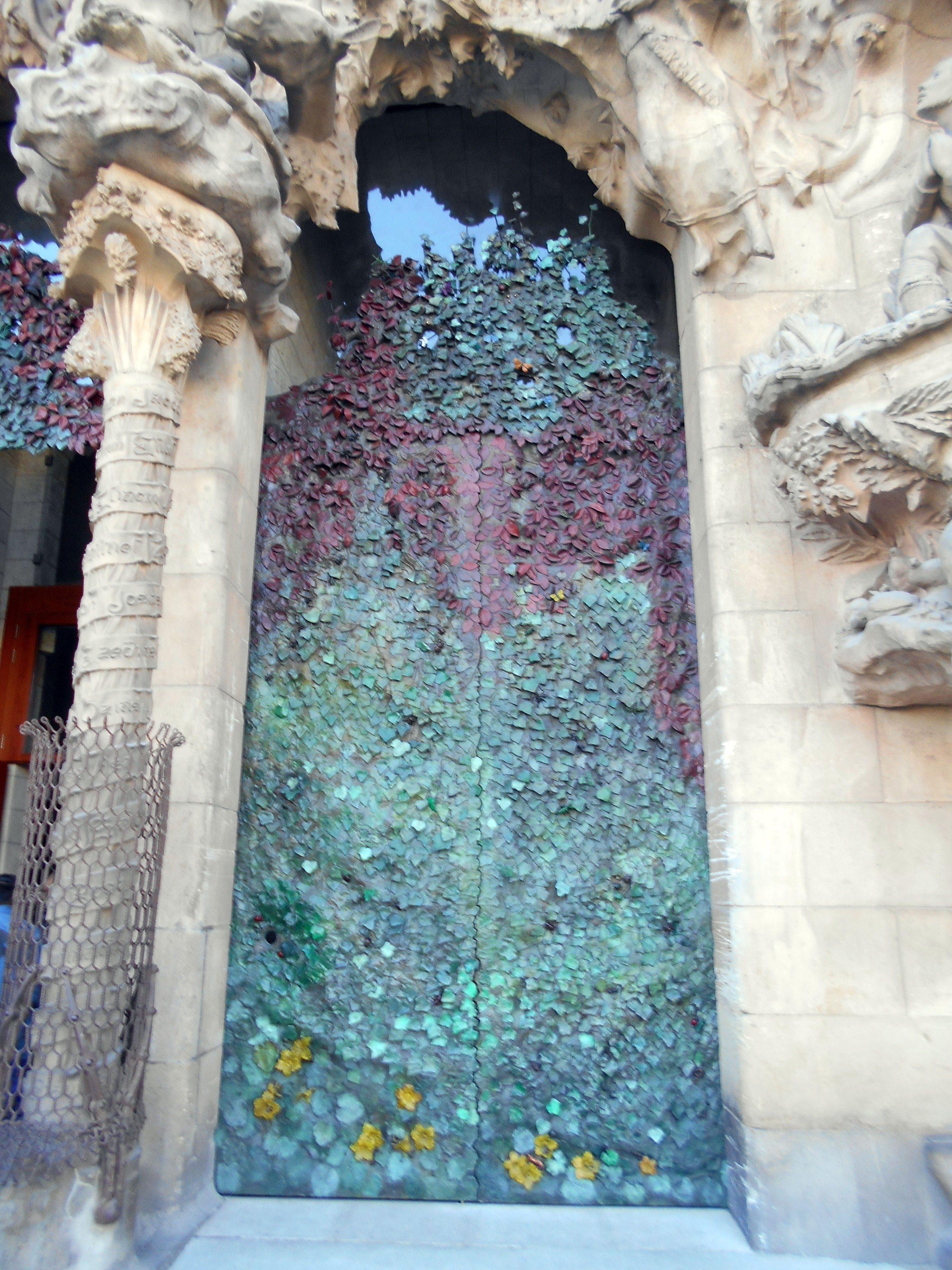 Puerta del Pórtico de la Caridad, de Etsuro Sotoo.